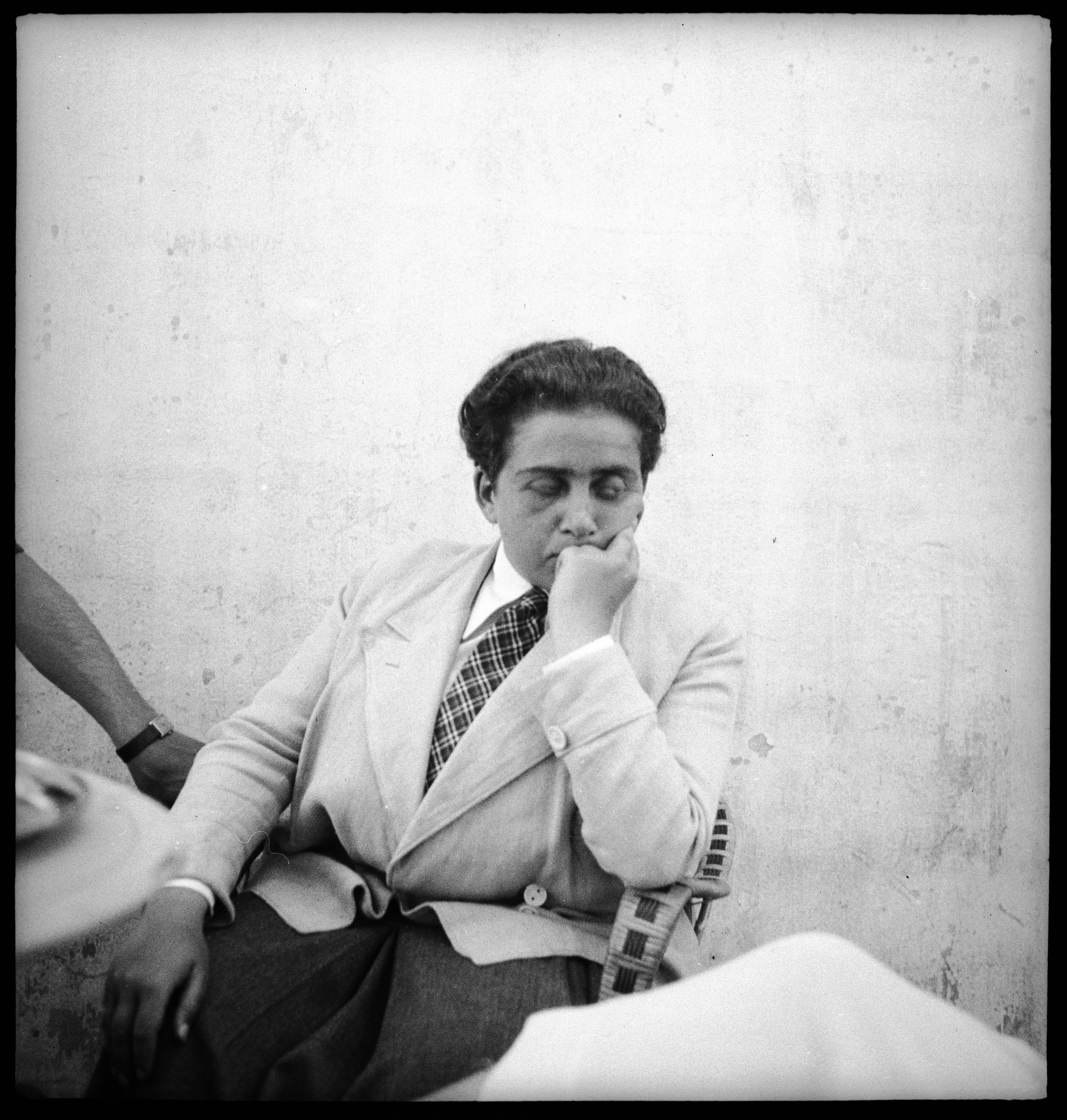 Frankreich, Lavandou: Menschen [Lokalisierung unsicher]; Therese Giehse